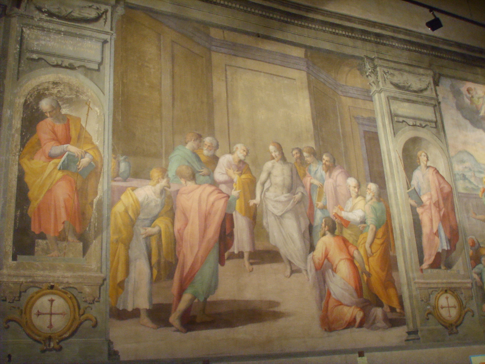 Gesù pellegrino, Giovanni Balducci, storie cristologiche 05 cena in emmaus